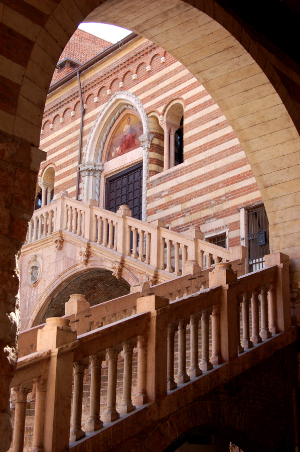 Scala della Ragione nell'omonimo palazzo di Verona (detto anche palazzo del Comune)